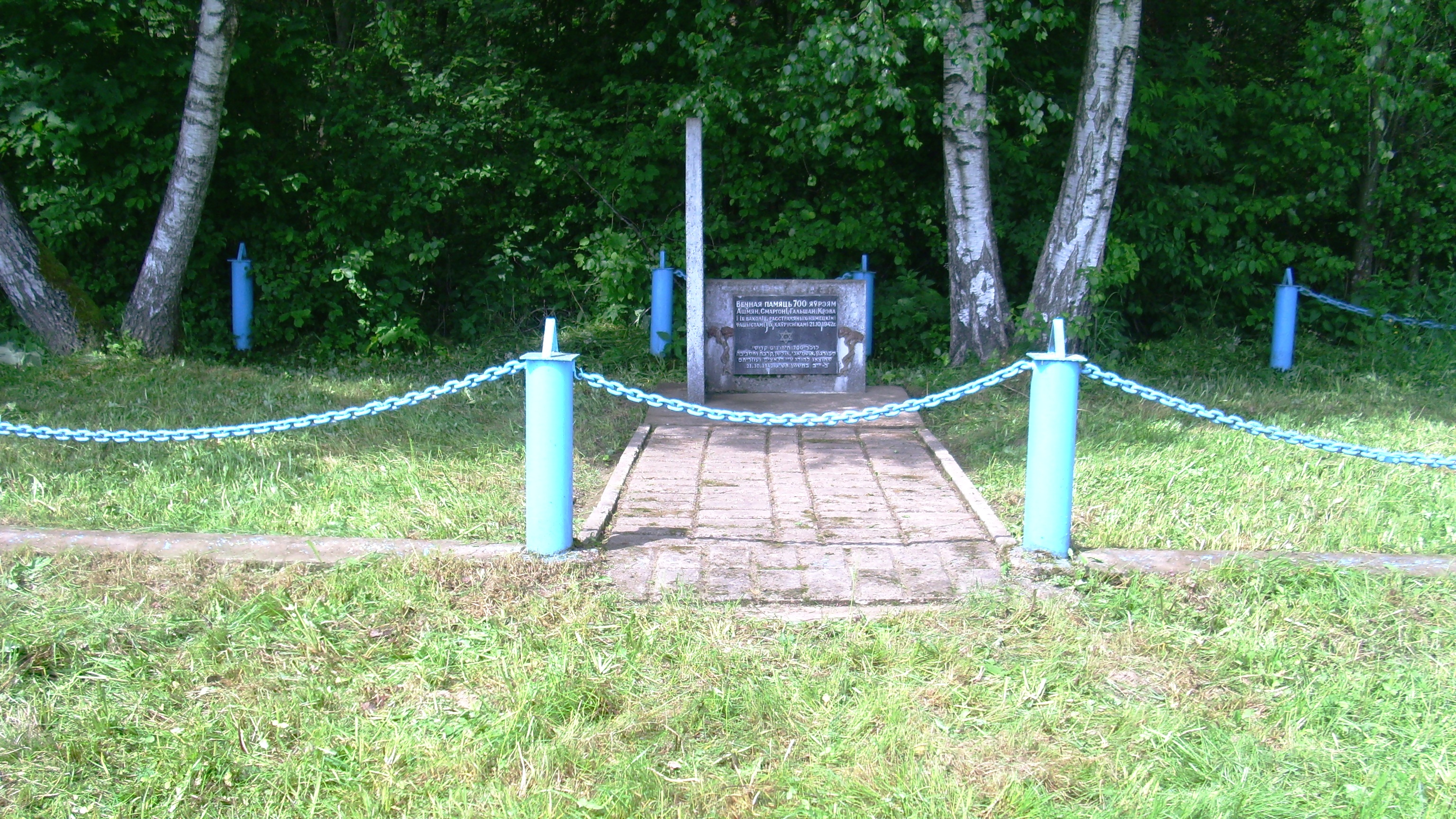 Памятник убитым во время Холокоста евреям у деревни Талминово (бывший хутор Углеева - он же Угливо, он же Аглейбы) Ошмянского района. Установлен в 1950 году.